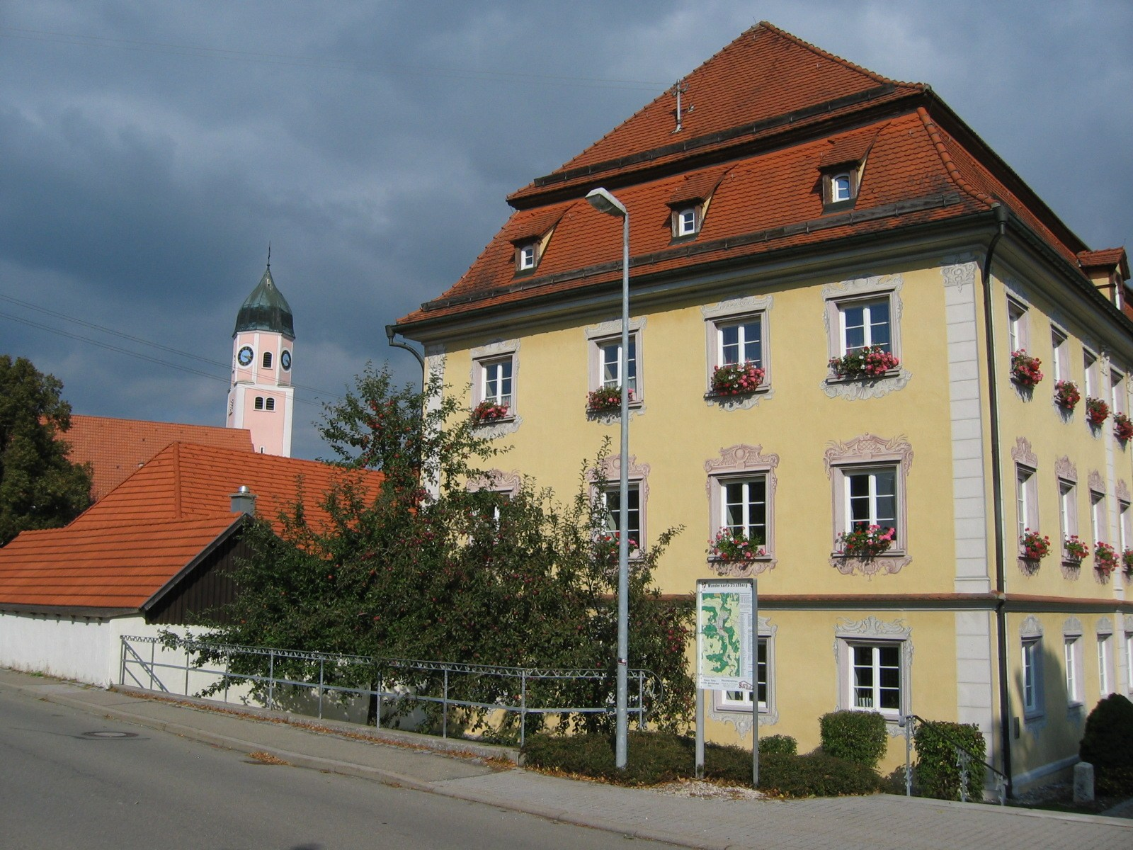 Straßberg, Zollernalbkreis: Ortsmitte mit Kirche und Rathaus